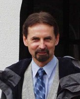 Prof. Jerzy Gutowski, polski entomolog